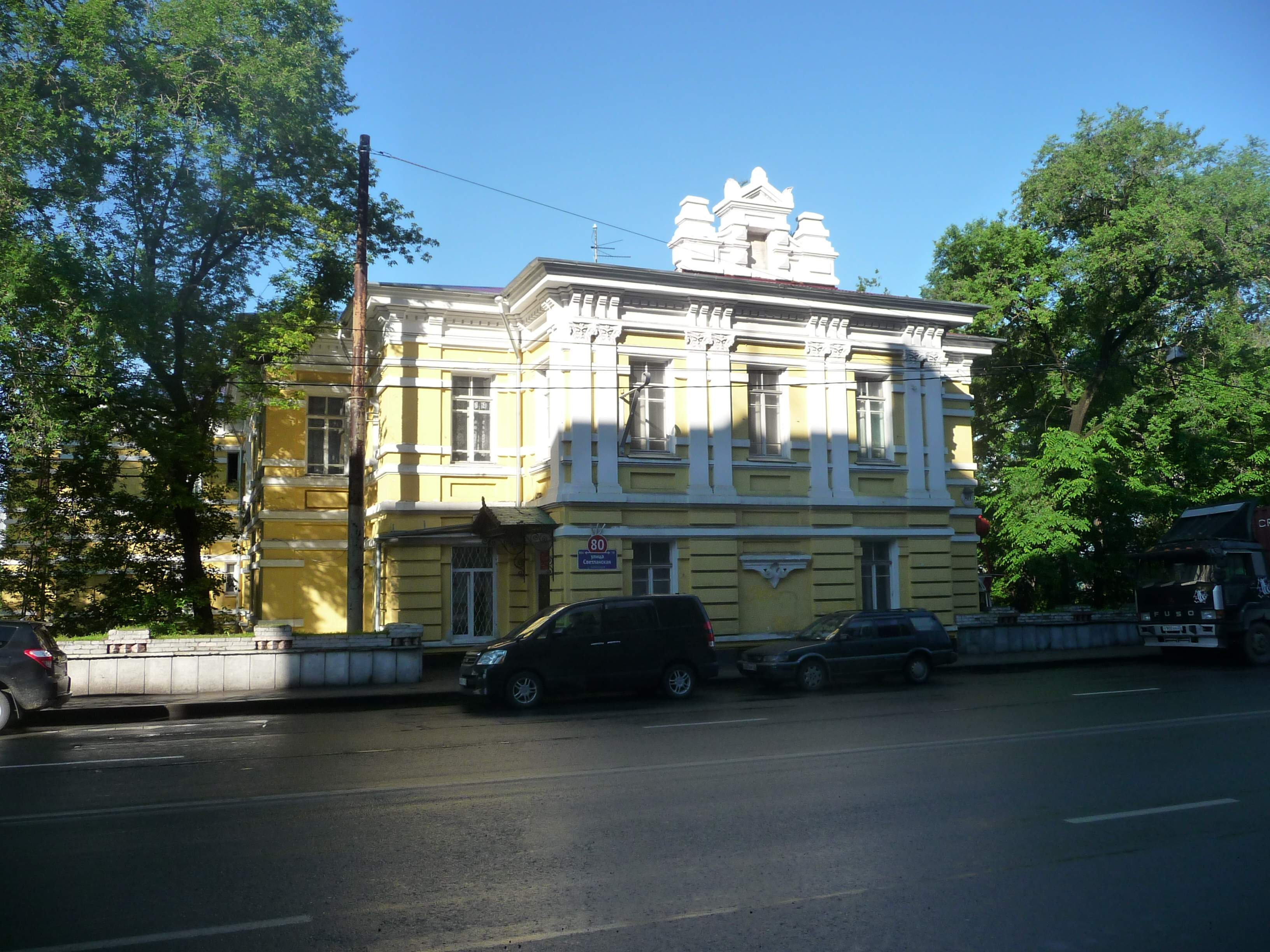 Владивосток, Светланская, 80, 2015-06-30